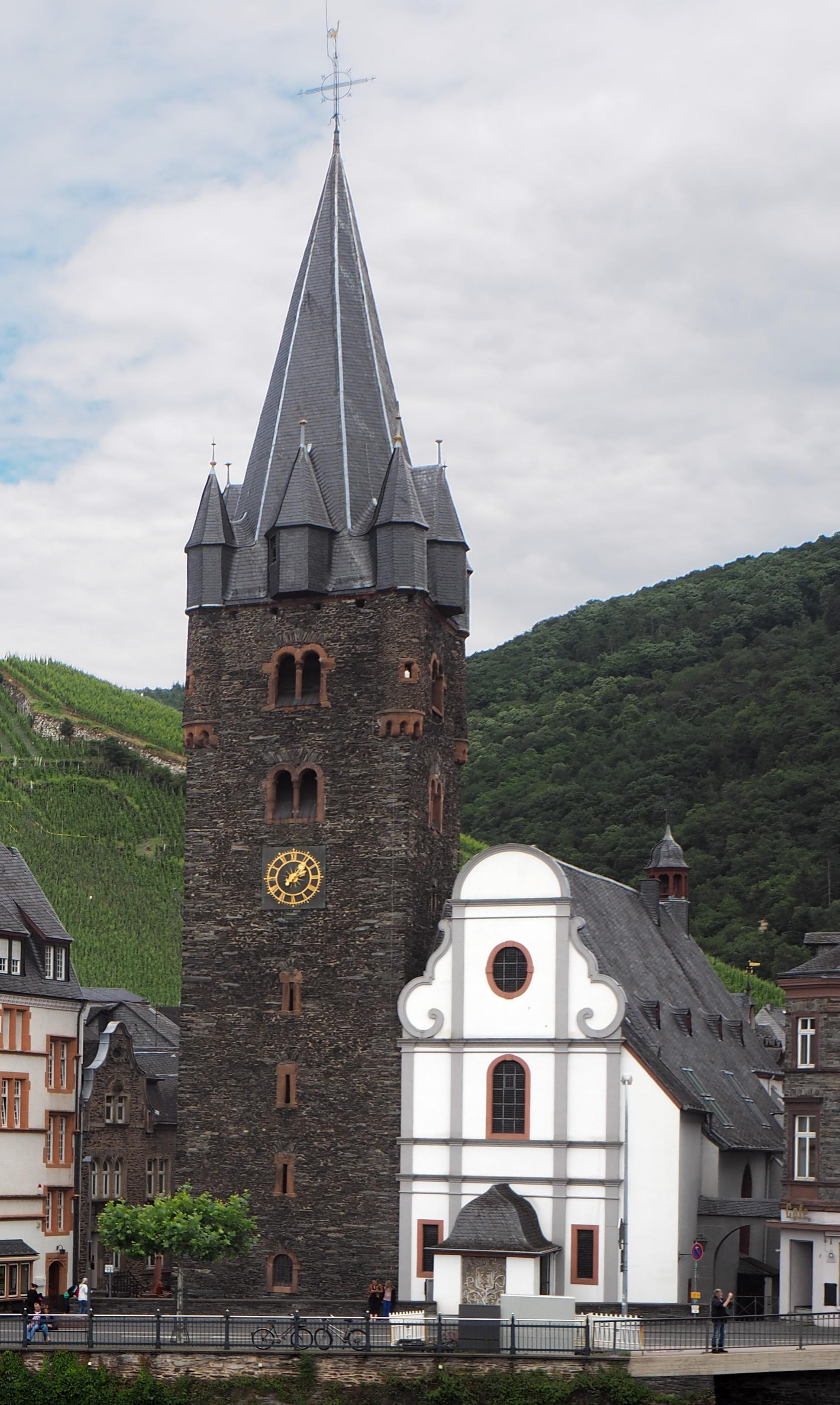 Berkastel-Kues, St. Michael und St. Sebastian